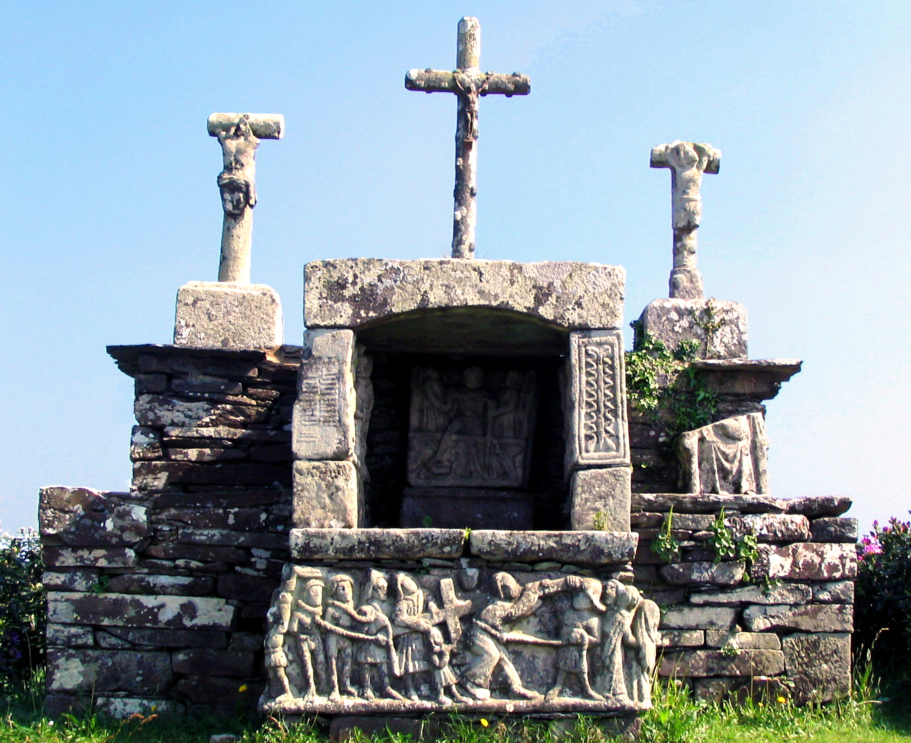 Saint-Hernin (Bretagne, Finistère) lieu dit Kerbreudeur, calvaire construit vers 1450, en granit de Scaër à gros grains. Il est vraisemblablement les plus ancien de Bretagne occidentale. Comprend un soubassement en moyen et petit appareil, de plan rectangulaire, formant massif à deux niveaux, le second en retraite, et trois croix écotées sur des socles cubiques; en avant-corps sur la face Nord-ouest, niche sur massif, composée de plusieurs dalles en granit sculptées en bas-relief, très altérées, sans doute remontées. Frise: Montée au Calvaire, Pâmoison de la Vierge. Dans la niche: Résurrection du Christ Sur le monument, socles cubiques et trois croix où, par contre, il y a un certain désordre, le bon larron à gauche du Christ. .